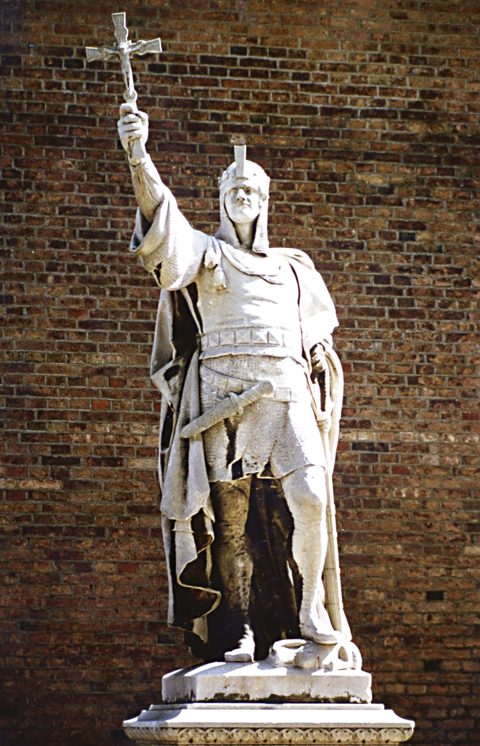 Denkmalstatue des askanischen Markgrafen Albrecht der Bär, seit 1978 in der Zitadelle Spandau. Standort bis 1945 in der Siegesallee im Berliner Tiergarten